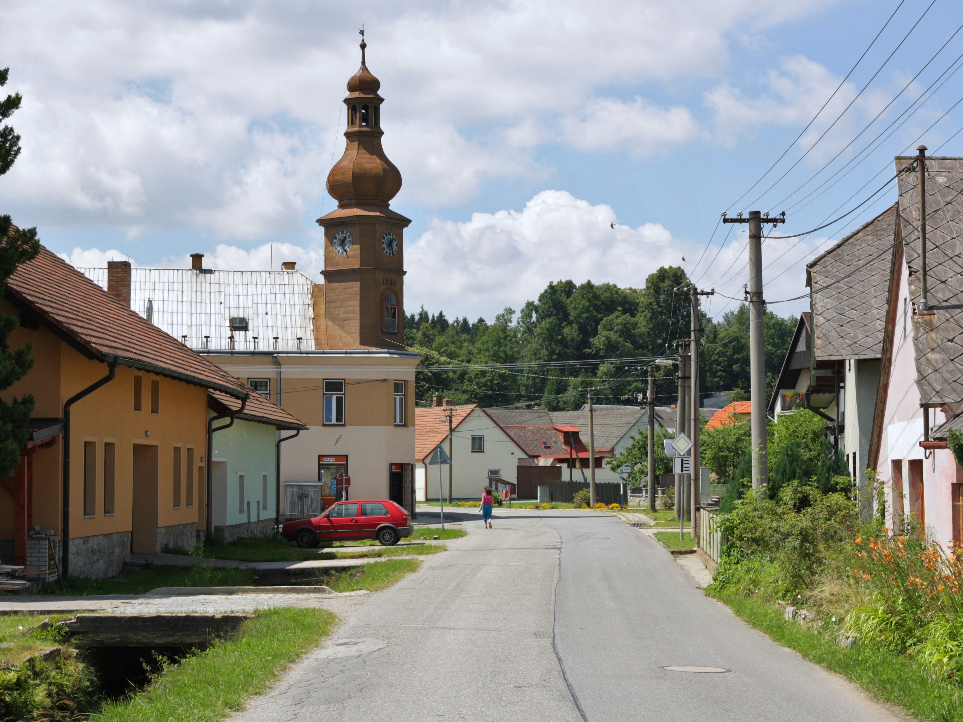 Horní Dubenky - hlavní ulice u obecního úřadu.